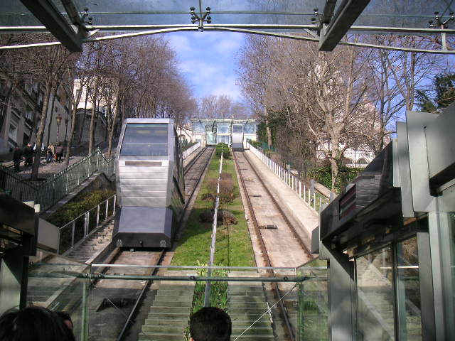 Funiculaire de Montmartre